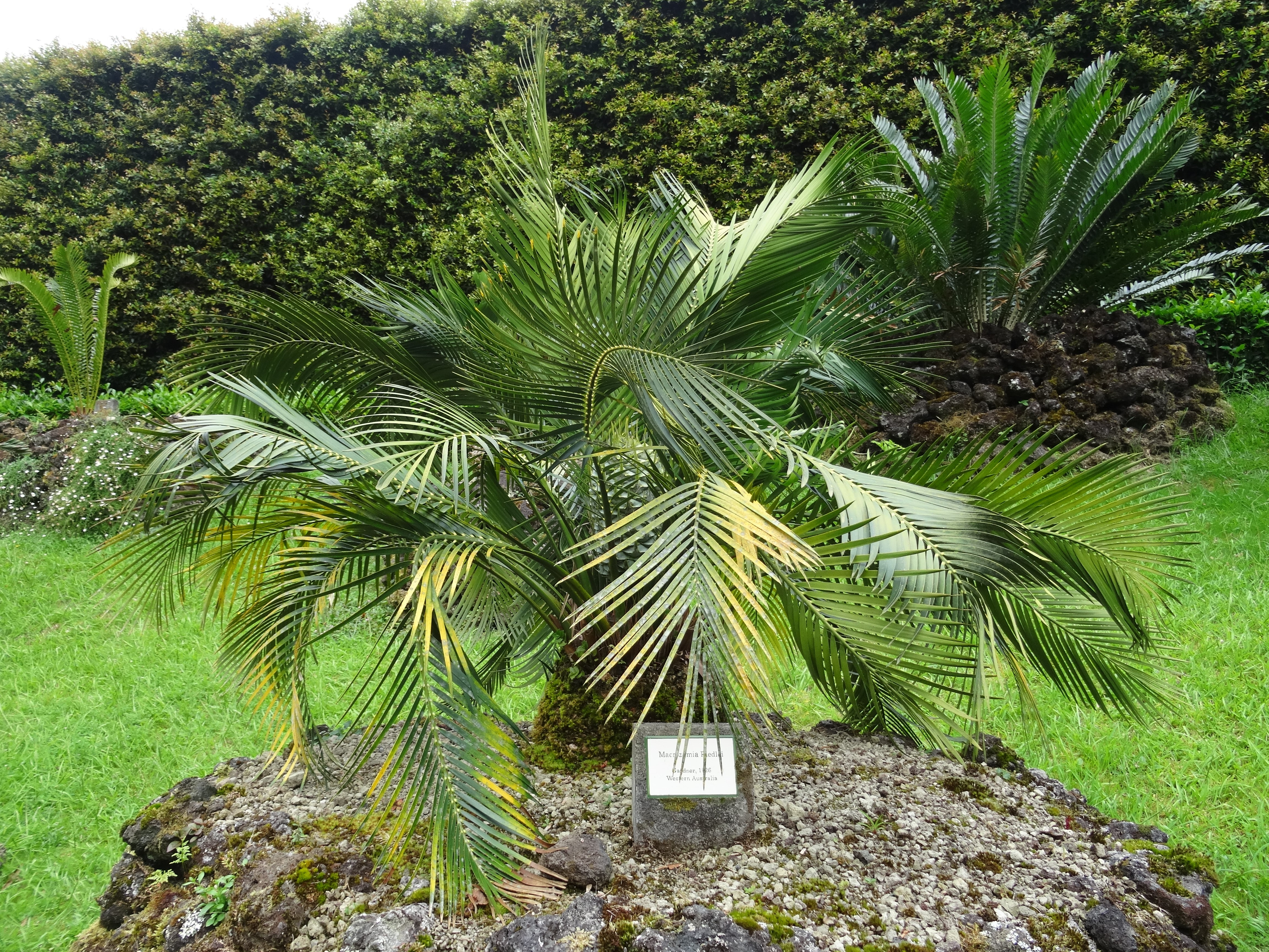 Macrozamia riedlei,Parque Terra Nostra, Furnas, Azoren